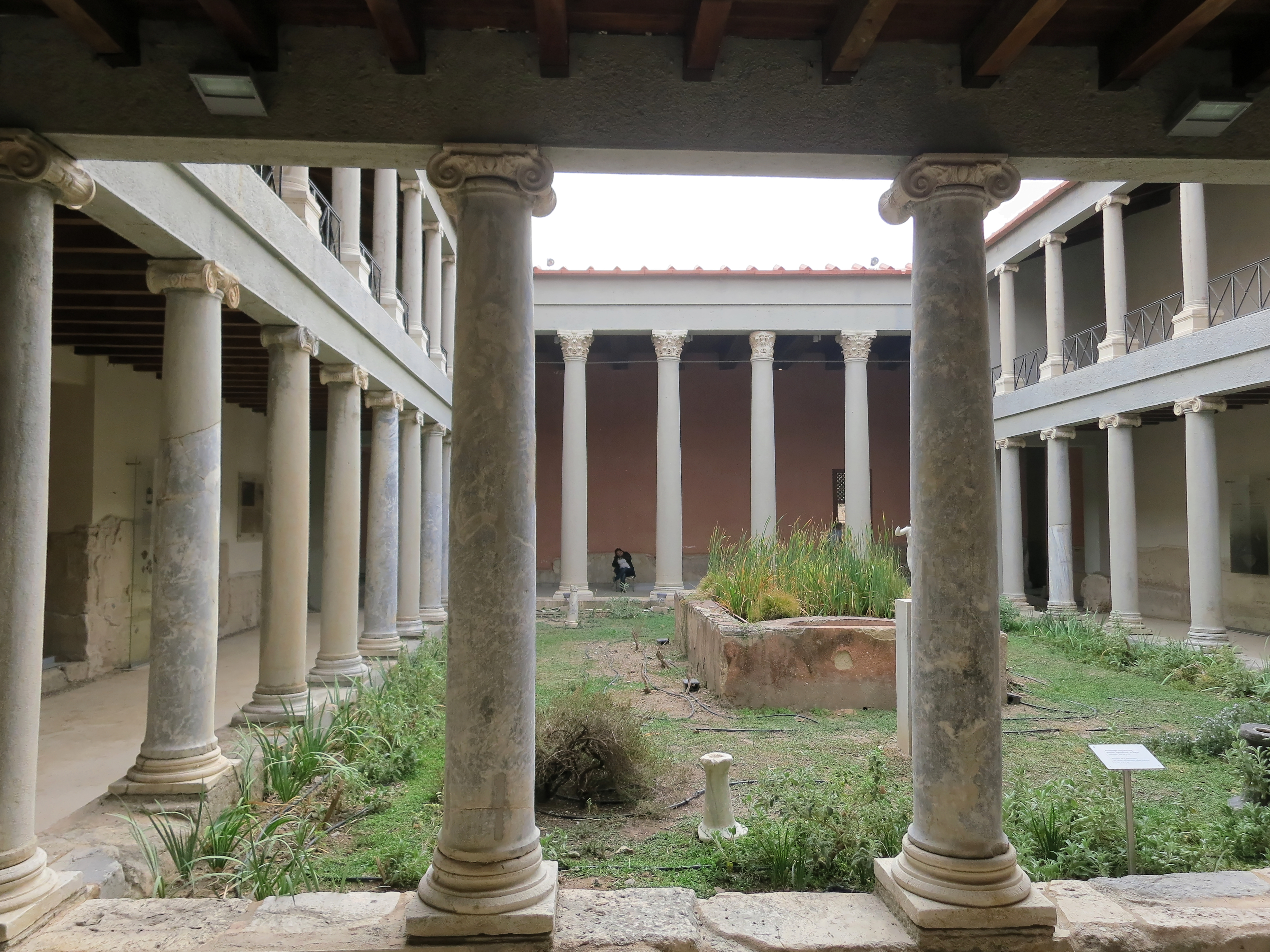 Die rekonstruierte römische Villa "Casa romana" in Kos (Stadt) auf der Insel Kos